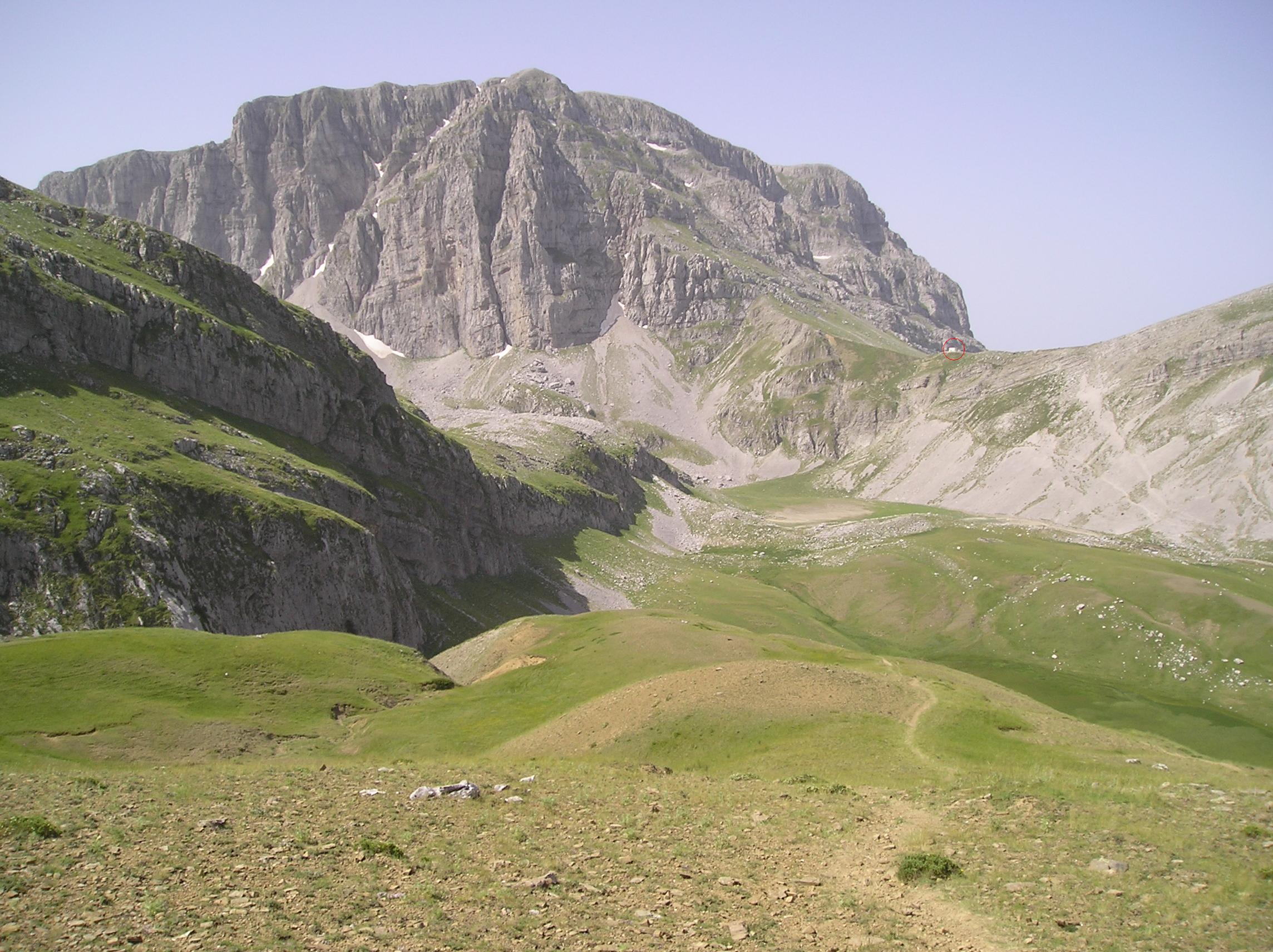 Το καταφύγιο του διάσελου της Αστράκας όπως φαίνεται από ΒΑ (περιβάλλεται από κόκκινο κύκλο). Στο βάθος και πίσω από το καταφύγιο διακρίνεται η κορυφή της Αστράκας.